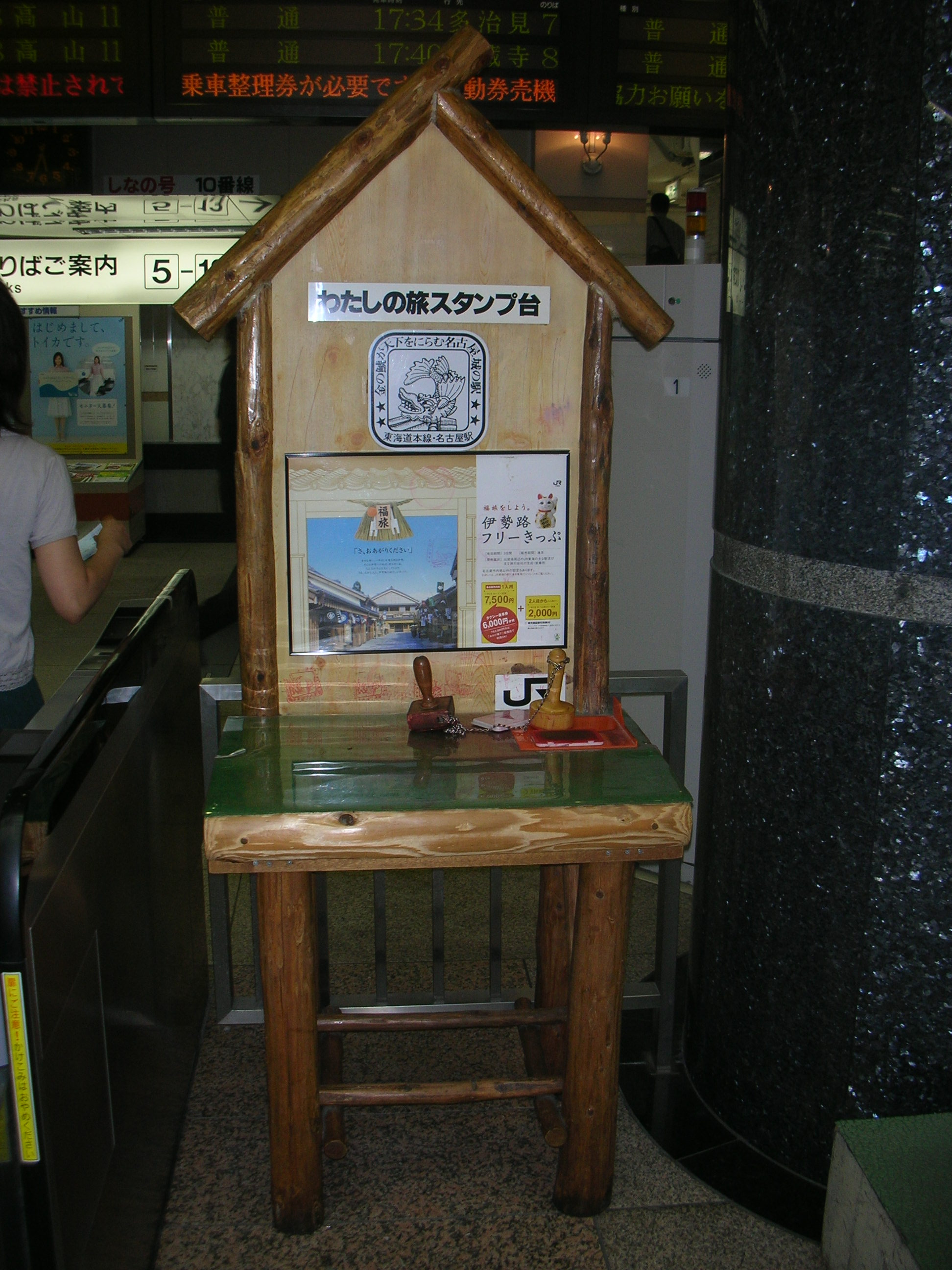 わたしの旅スタンプ台。東海旅客鉄道名古屋駅で撮影。